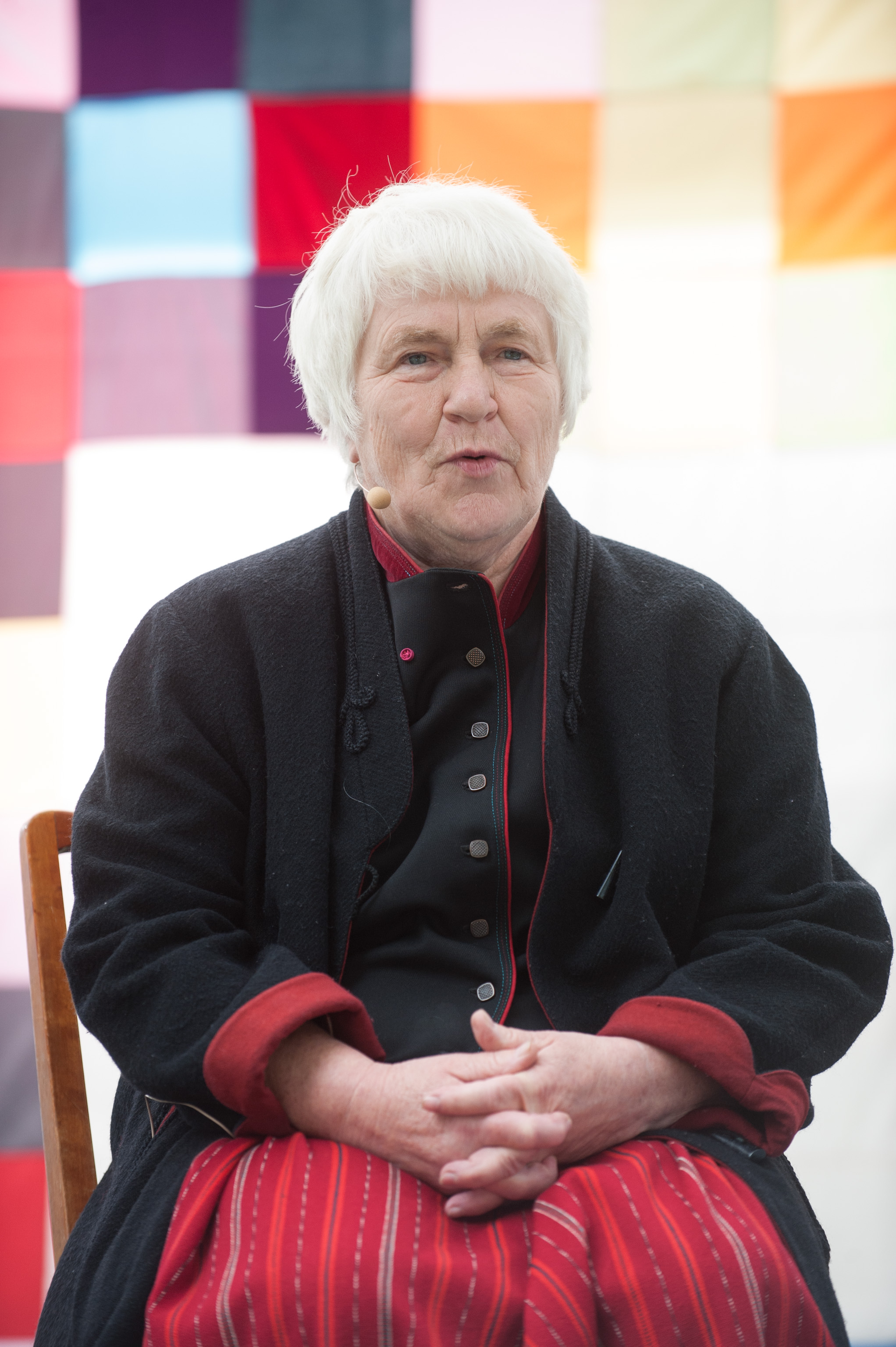 Anu Raud